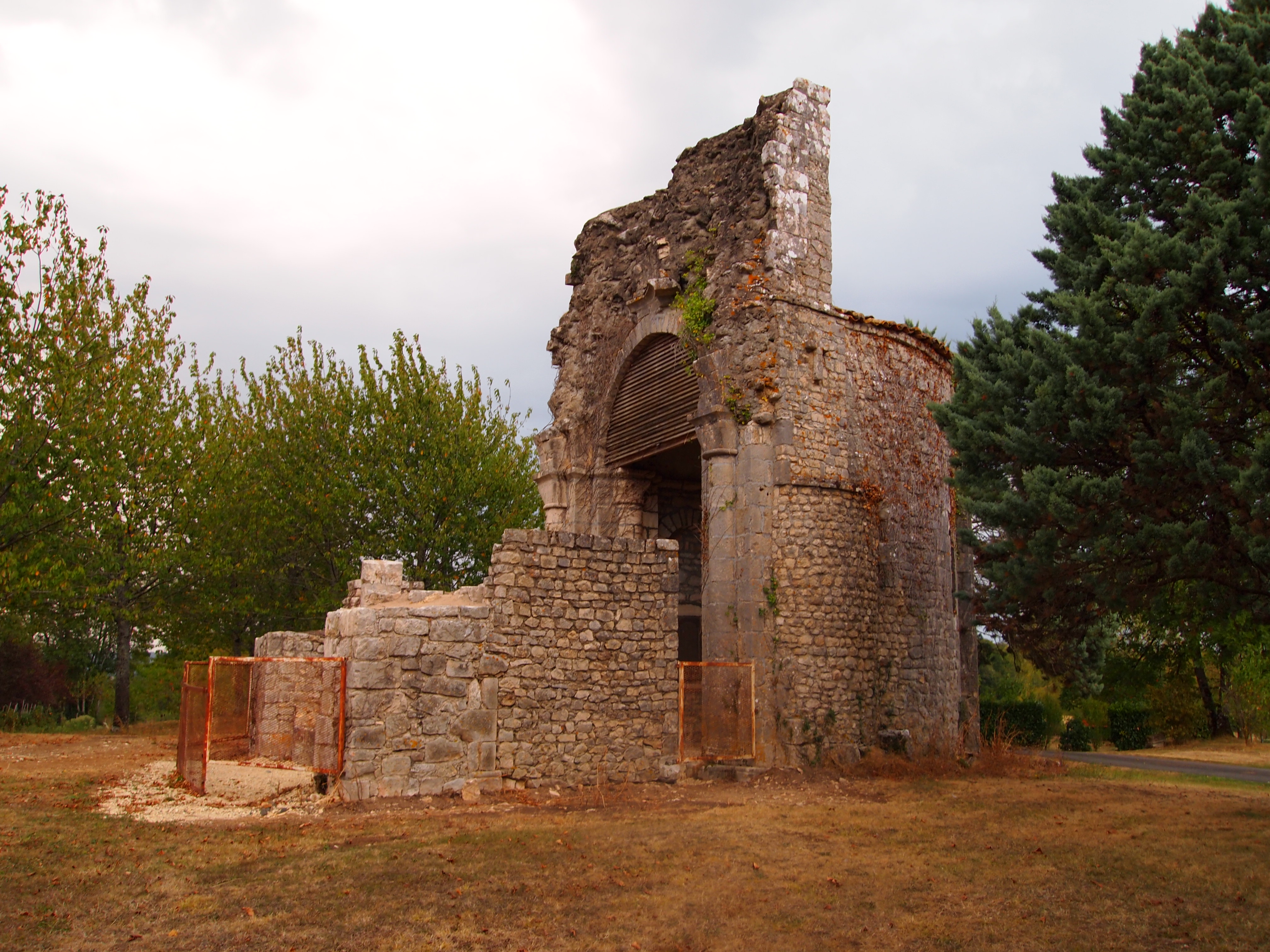 Ancien prieuré Saint-Sylvestre, à Saint-Sauveur, Marthon en Charente (France) (inscrit, 1978)